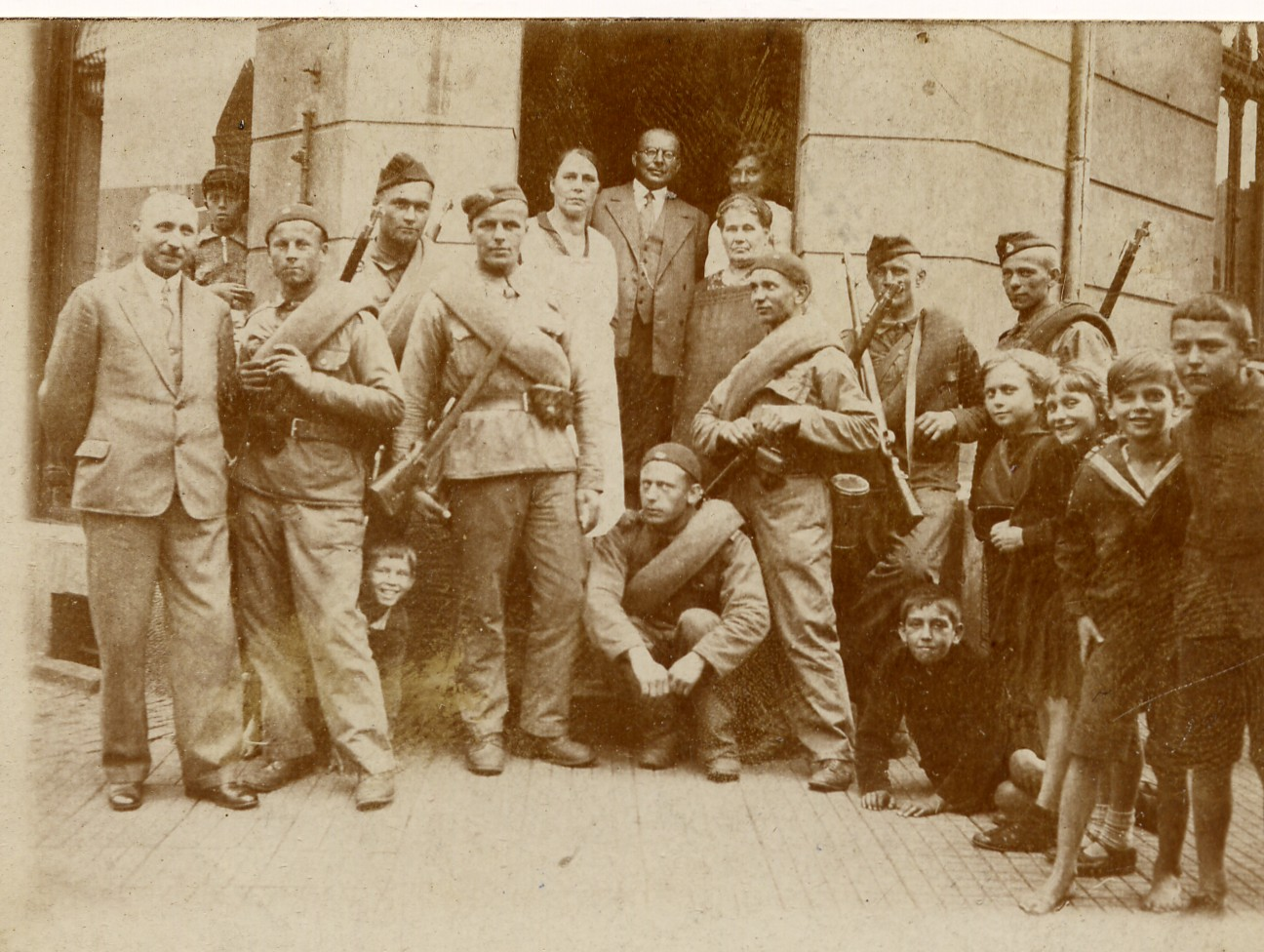 Piekarnia w X wojsko Ludwik 1930 . Fotokopia - skan z mojego albumu rodzinnego